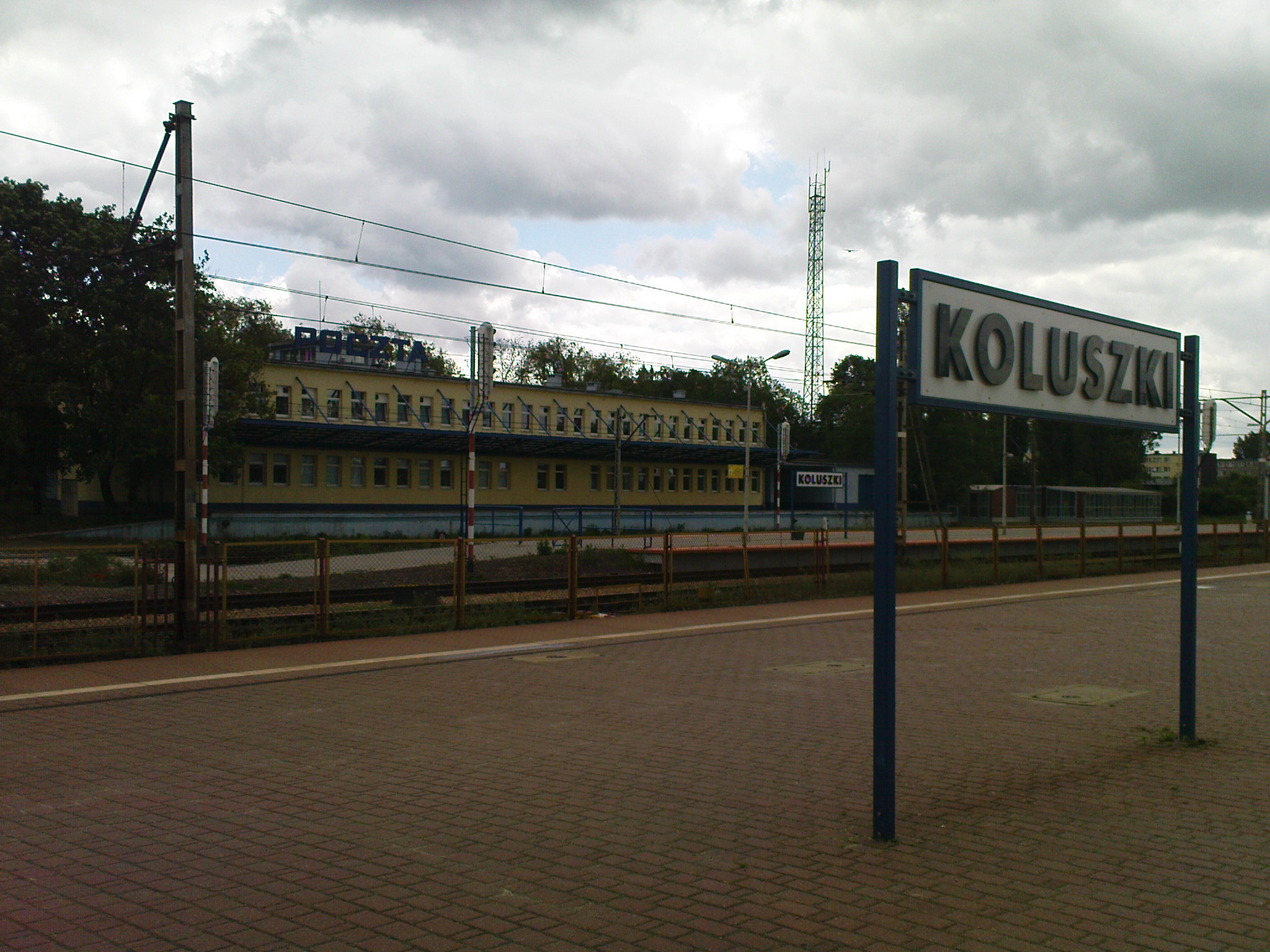 Koluszki, poczta i peron.